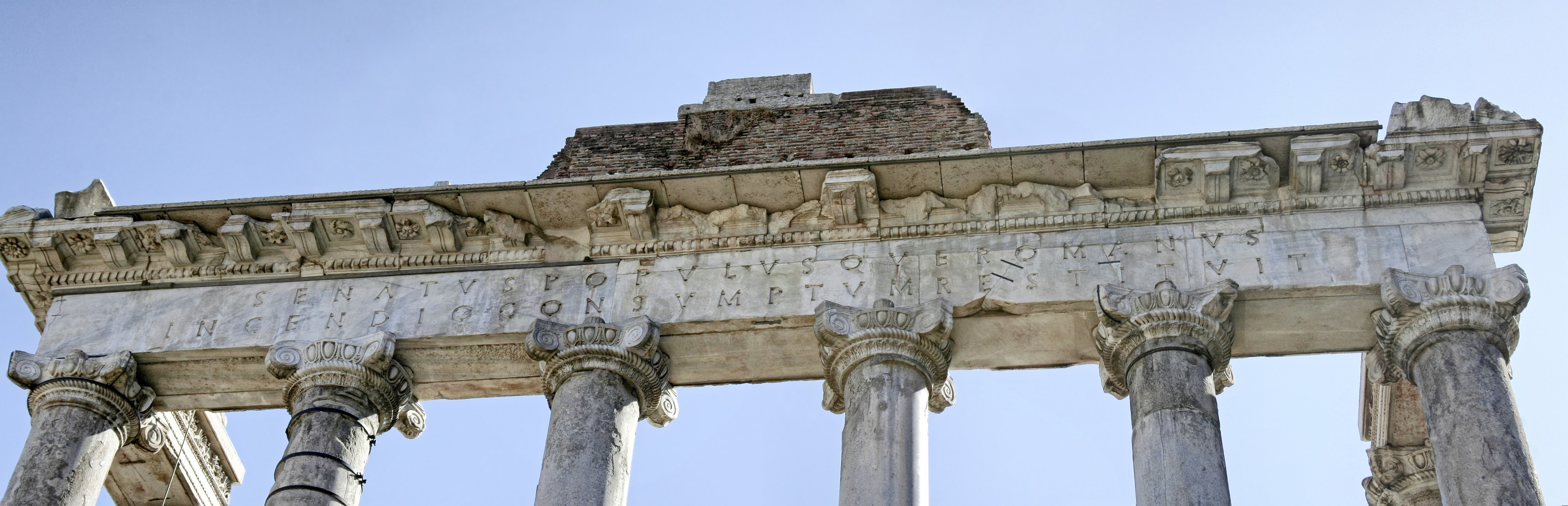 Entablement du temple de Saturne. Inscription : SENATUS POPULUSQUE ROMANUS INCENDIO CONSUMPTUM RESTITUIT